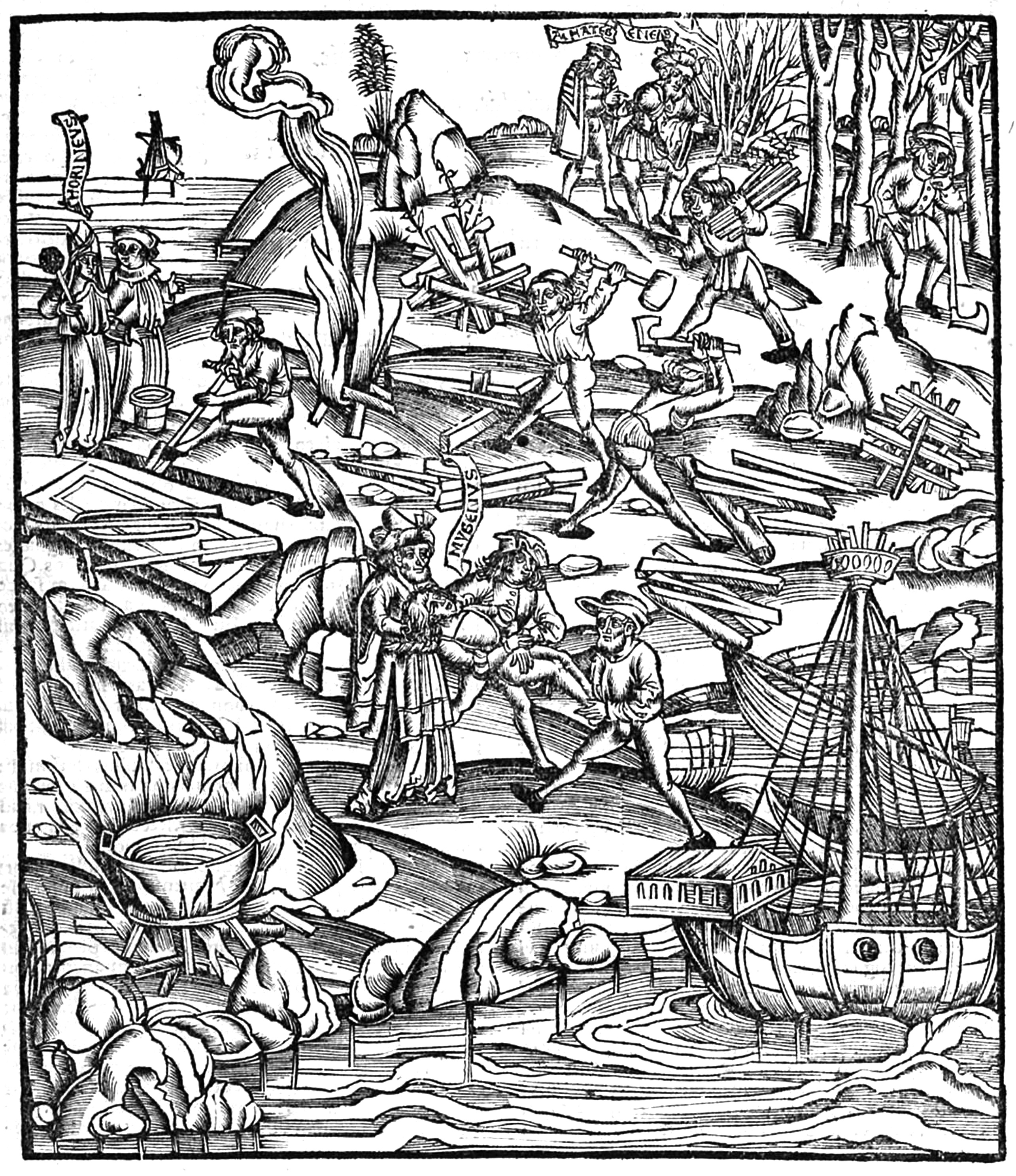 I Troiani preparano la sepoltura di Miseno. Virgilio, Eneide VI, vv. 156-182, xilografia, in Virgilio, Opera, Lugduni Typographaria Officina Ioannis Crespini, 1529